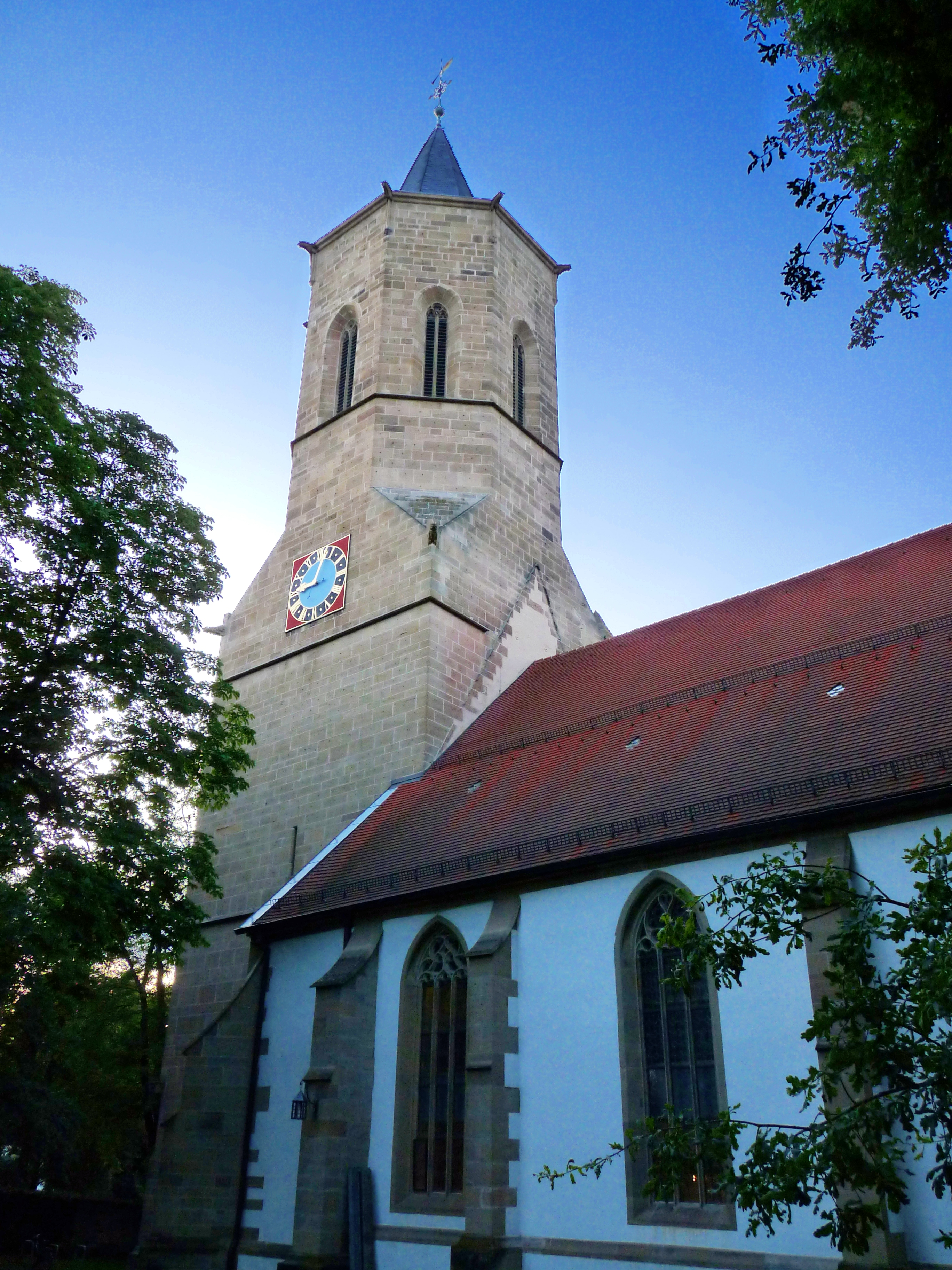 Michaelskirche in Waiblingen, 1496 von Hans Ulmer erbaut